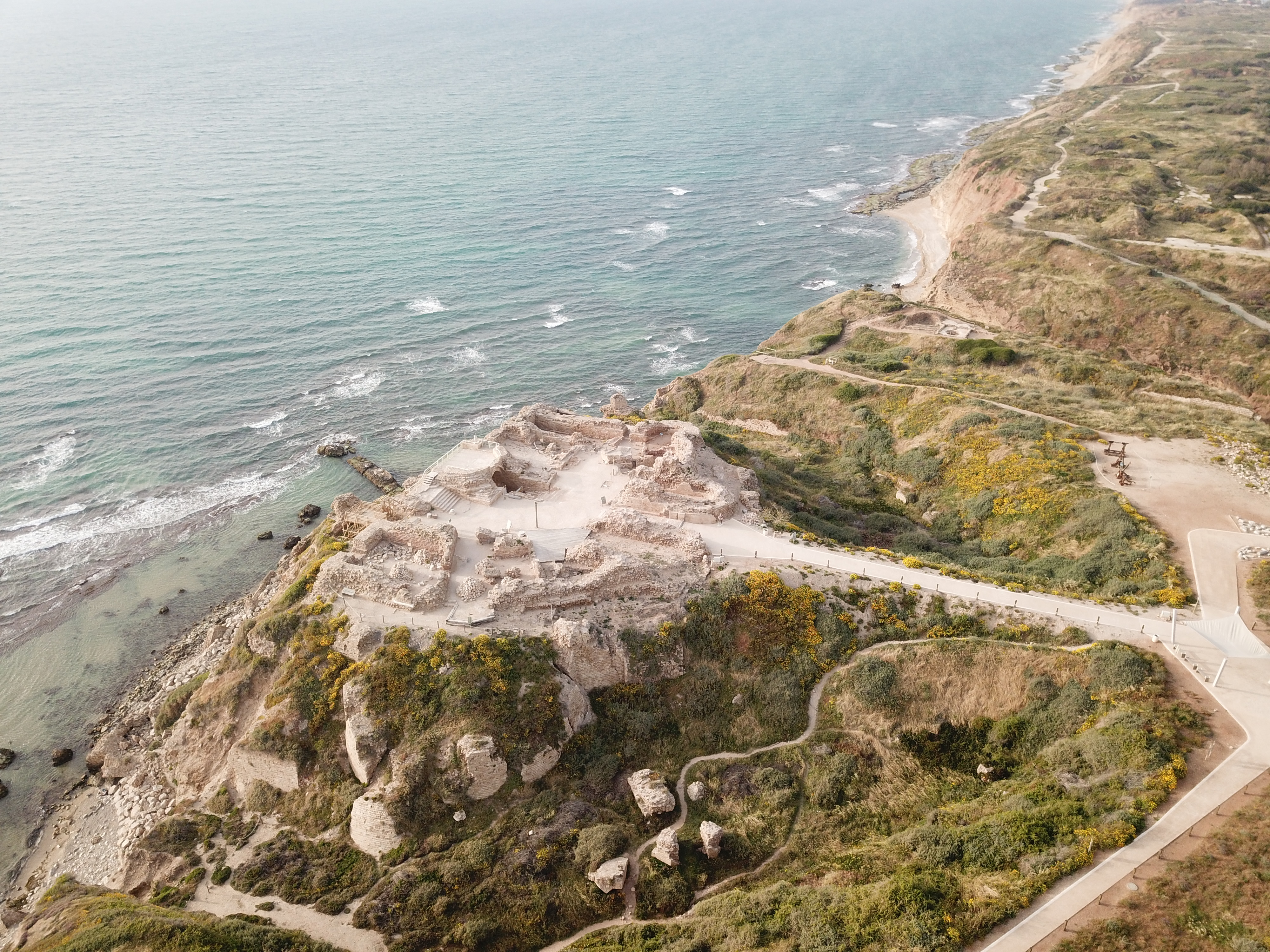 מבצר אפולוניה